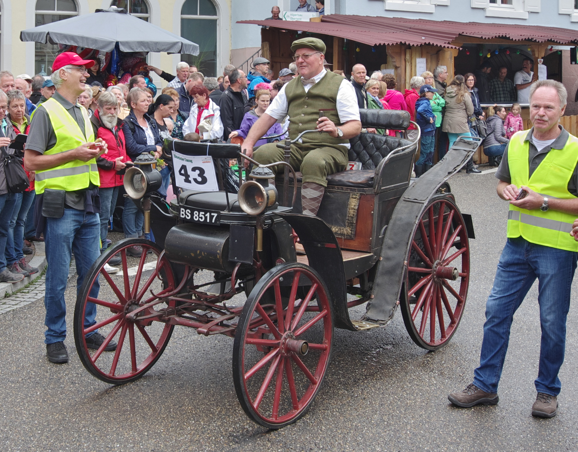 Der Orient-Express Nr. 104 der Bergmann-Industriewerke Gaggenau, Baujahr 1897, beim Historischen Festumzug anlässlich des Jubiläums 800 Jahre Gernsbach, auf der Hofstätte. Mit Warnweste links: Stefan Schwaab vom Unimog-Museum. Rechts: Michael Wessel.